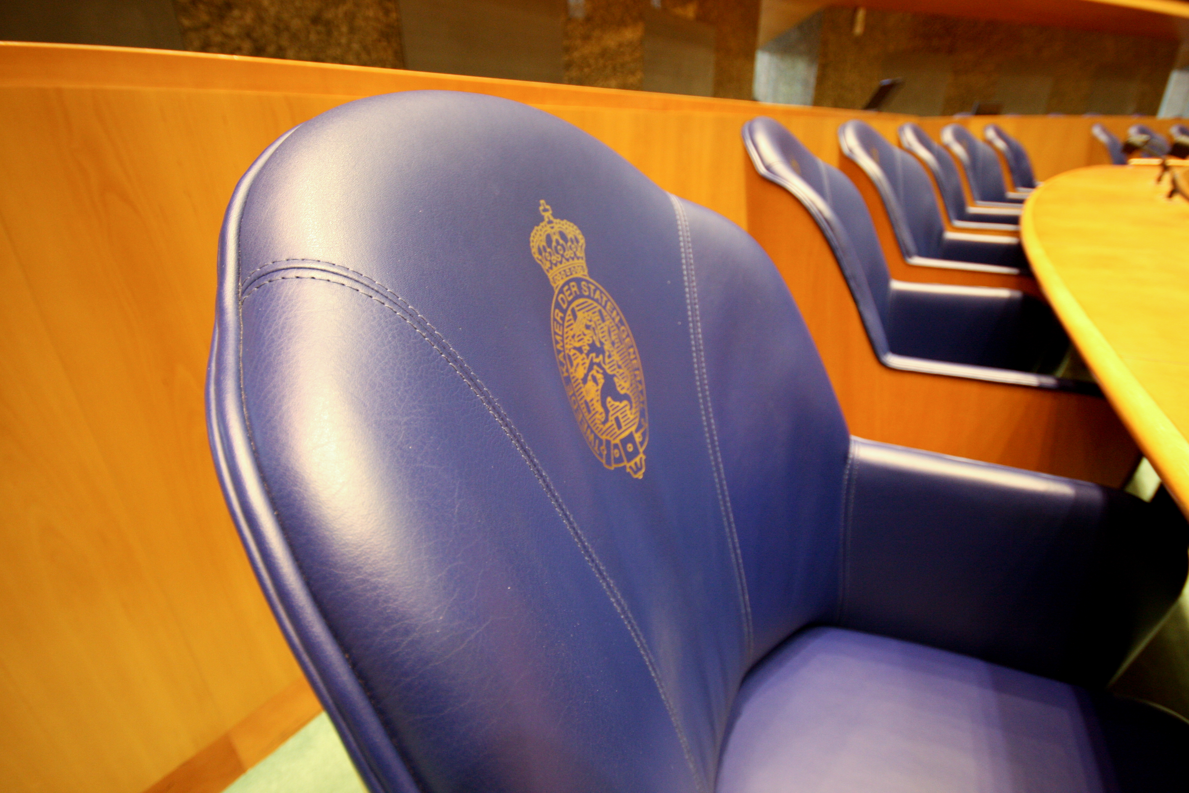 kamerzetels